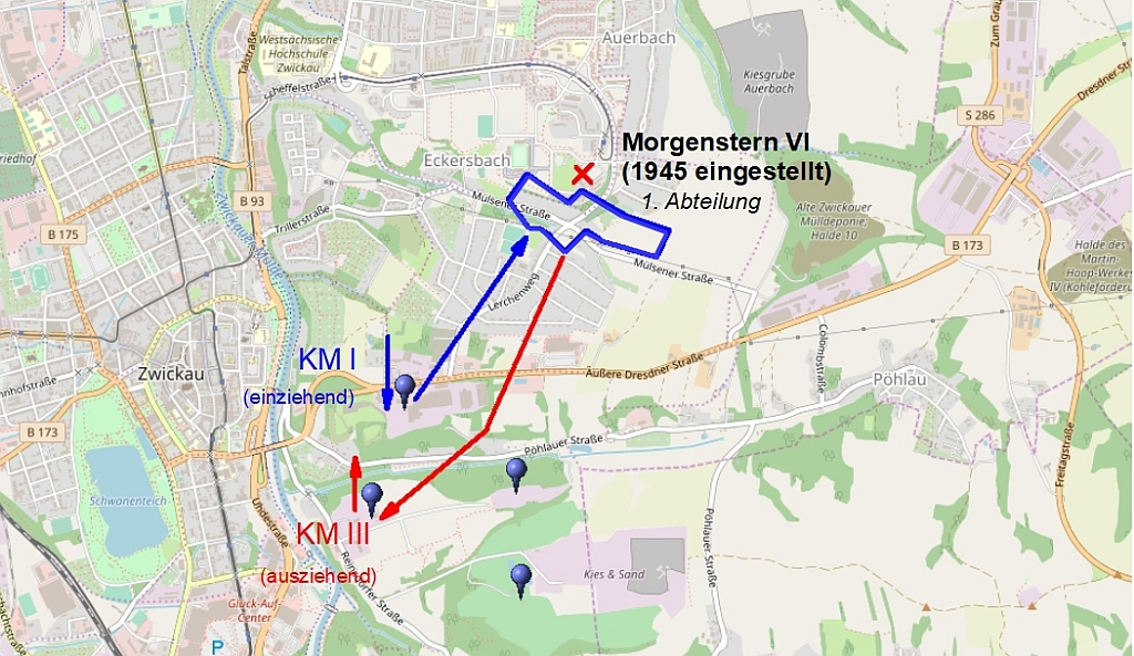 Lage der 1. Abteilung des Steinkohlenwerkes "Karl Marx" Zwickau mit schematischer Wetterführung. Sachsen, Deutschland. This map may be incomplete, and may contain errors. Don't rely solely on it for navigation.